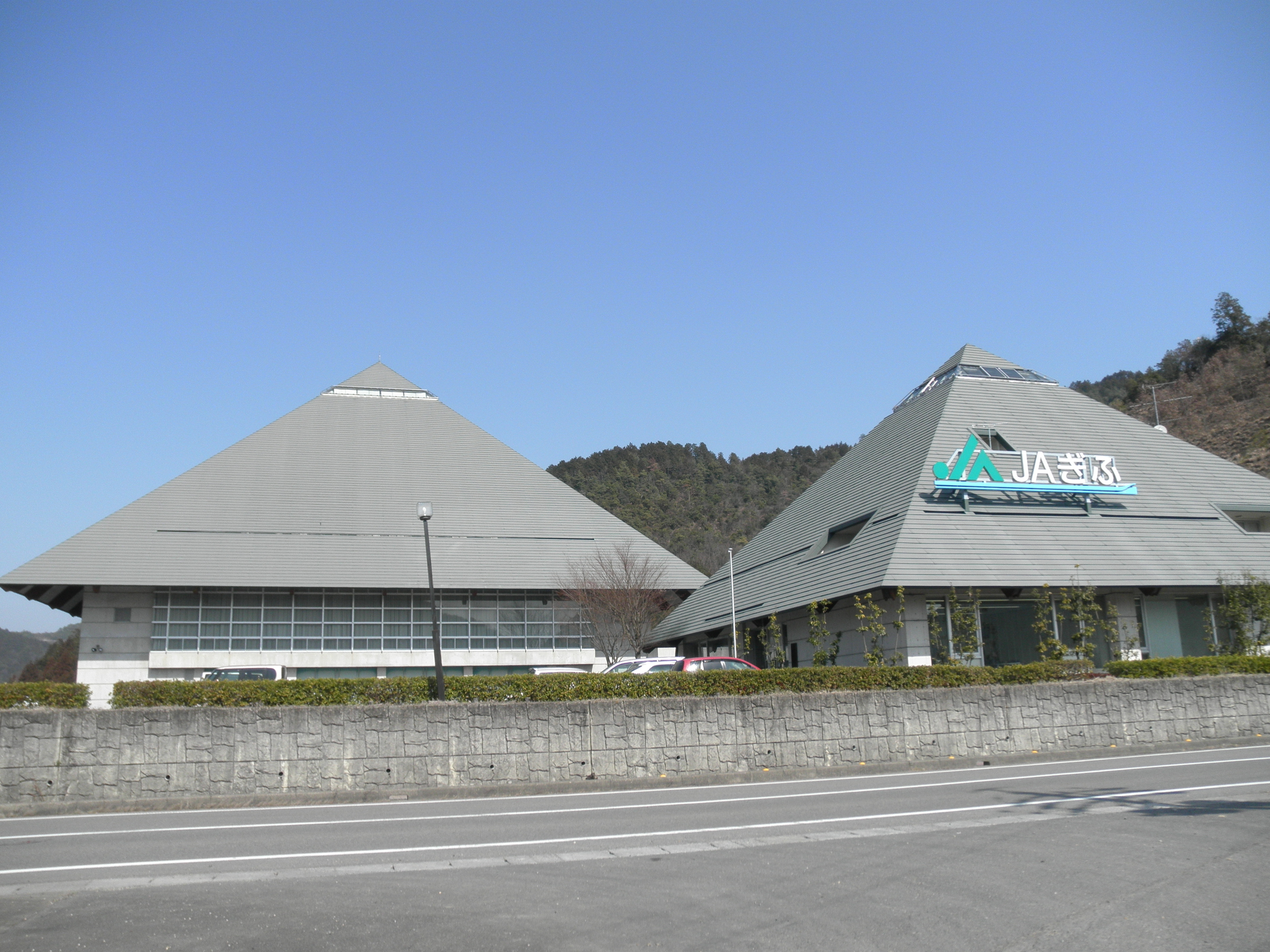 JAぎふ アグリパーク鈴ヶ坂